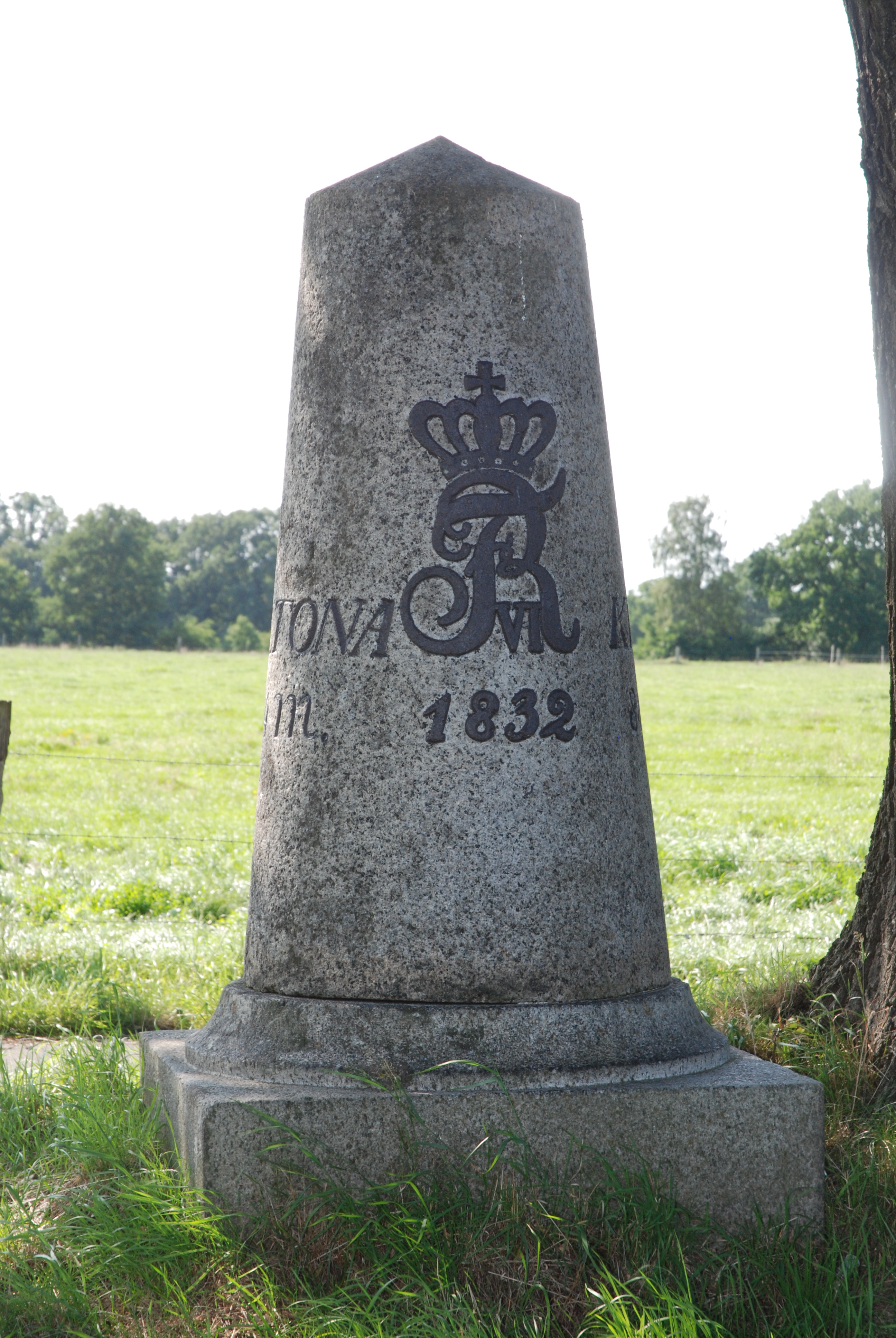 Meilenstein von 1832 an der Bundesstraße 4 (Altona/Kiel)